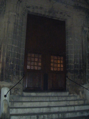 Església de Santa Creu (Palma, Mallorca)